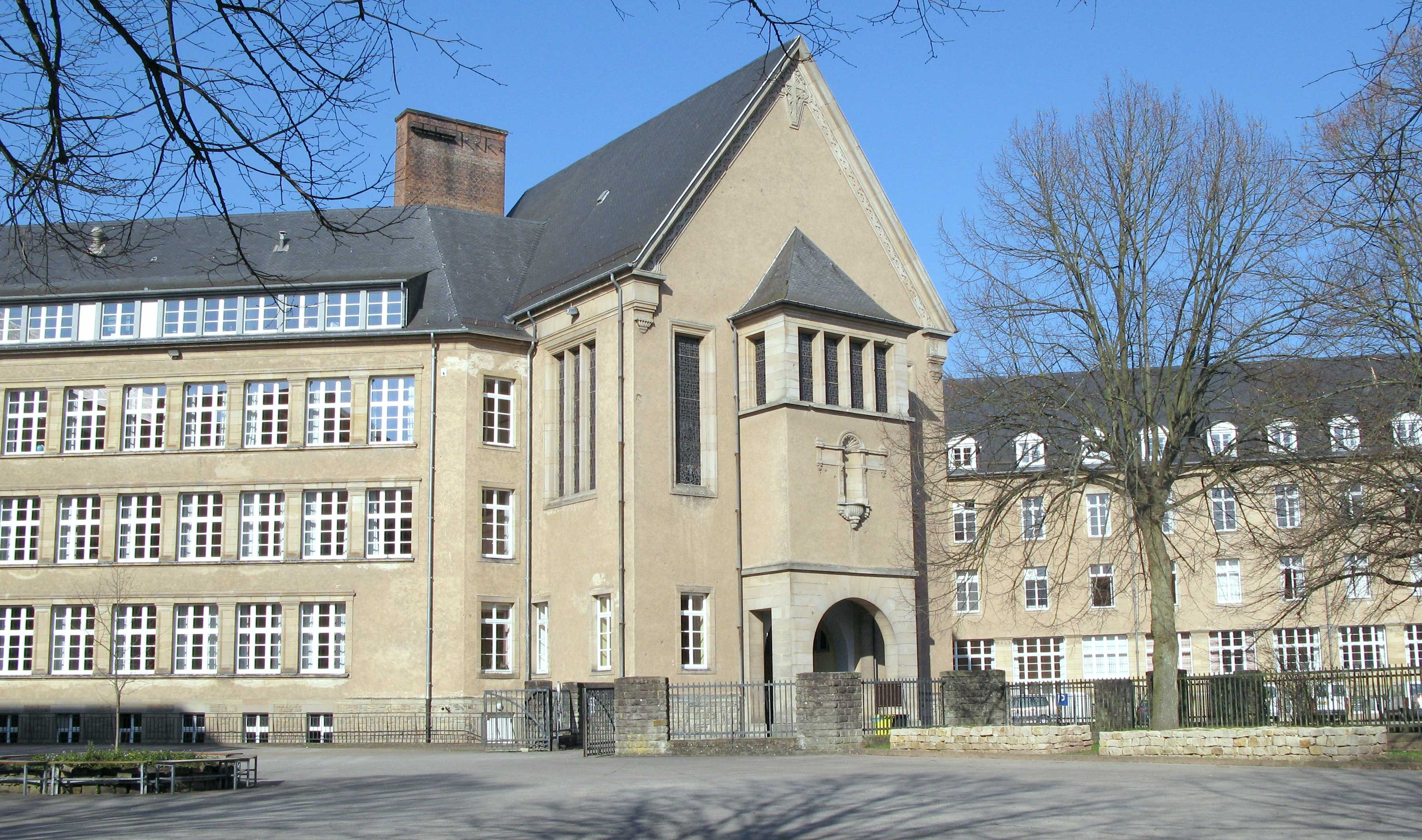 Akerbauschoul Gebaier